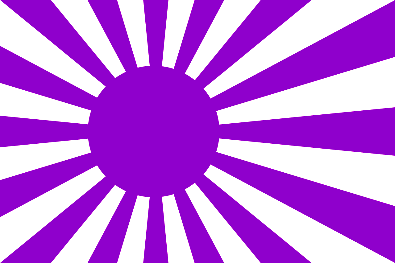 Sole Nascente Viola in campo bianco: simbolo della Contrada di Mazzaferro